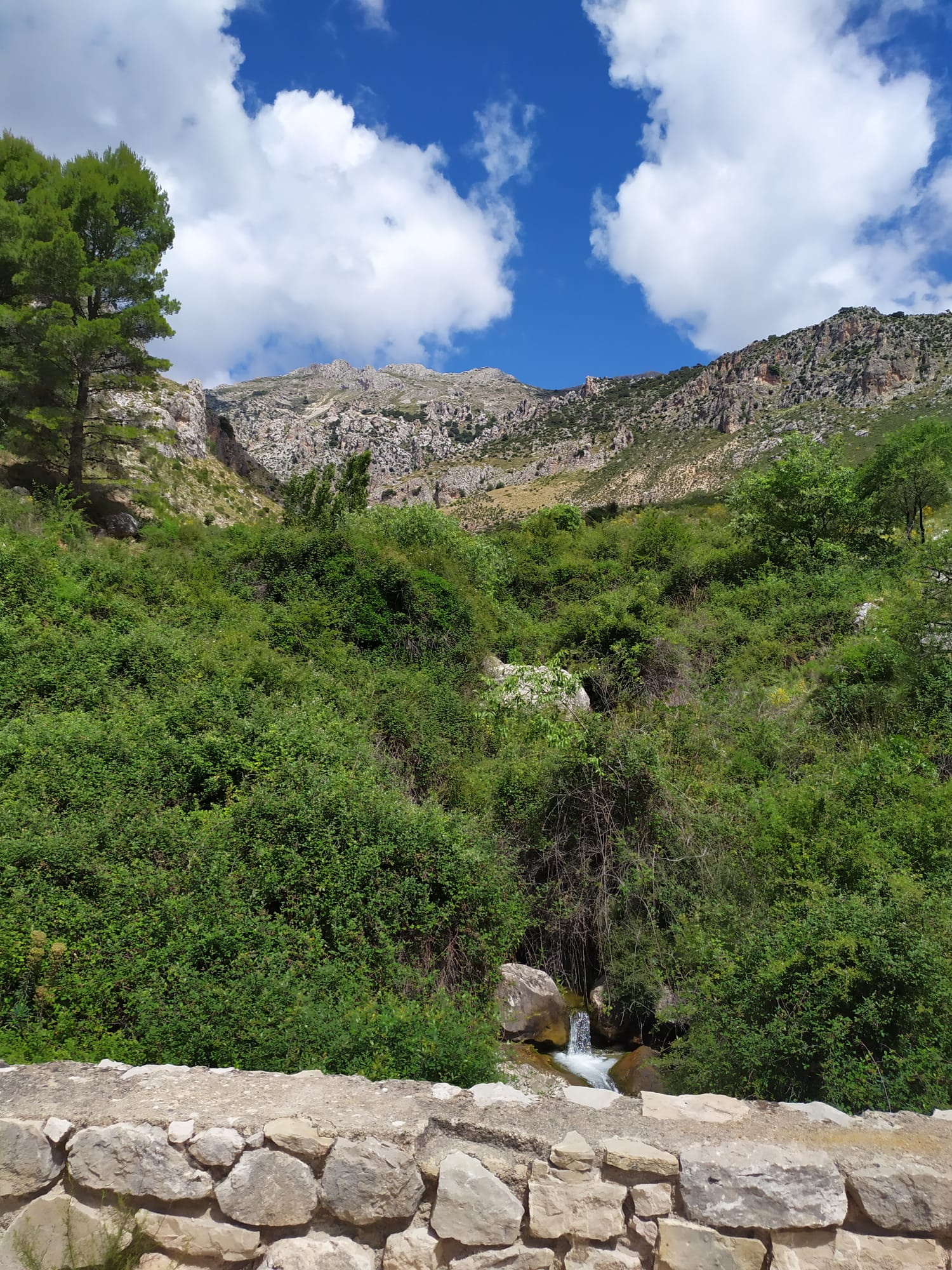 Desfiladero del río Gargantón visto desde el puente (Bélmez de la Moraleda)